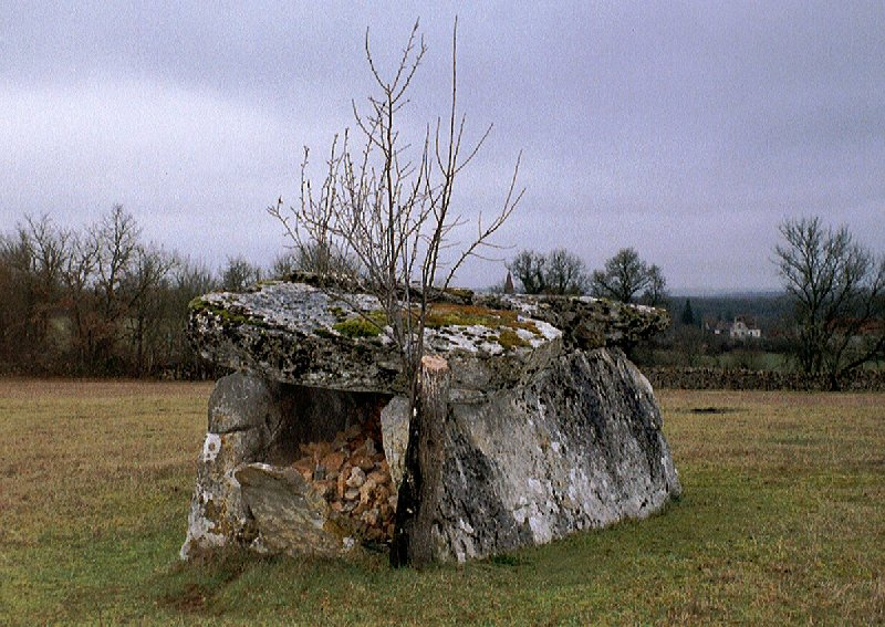 Dolmen du Coustalou